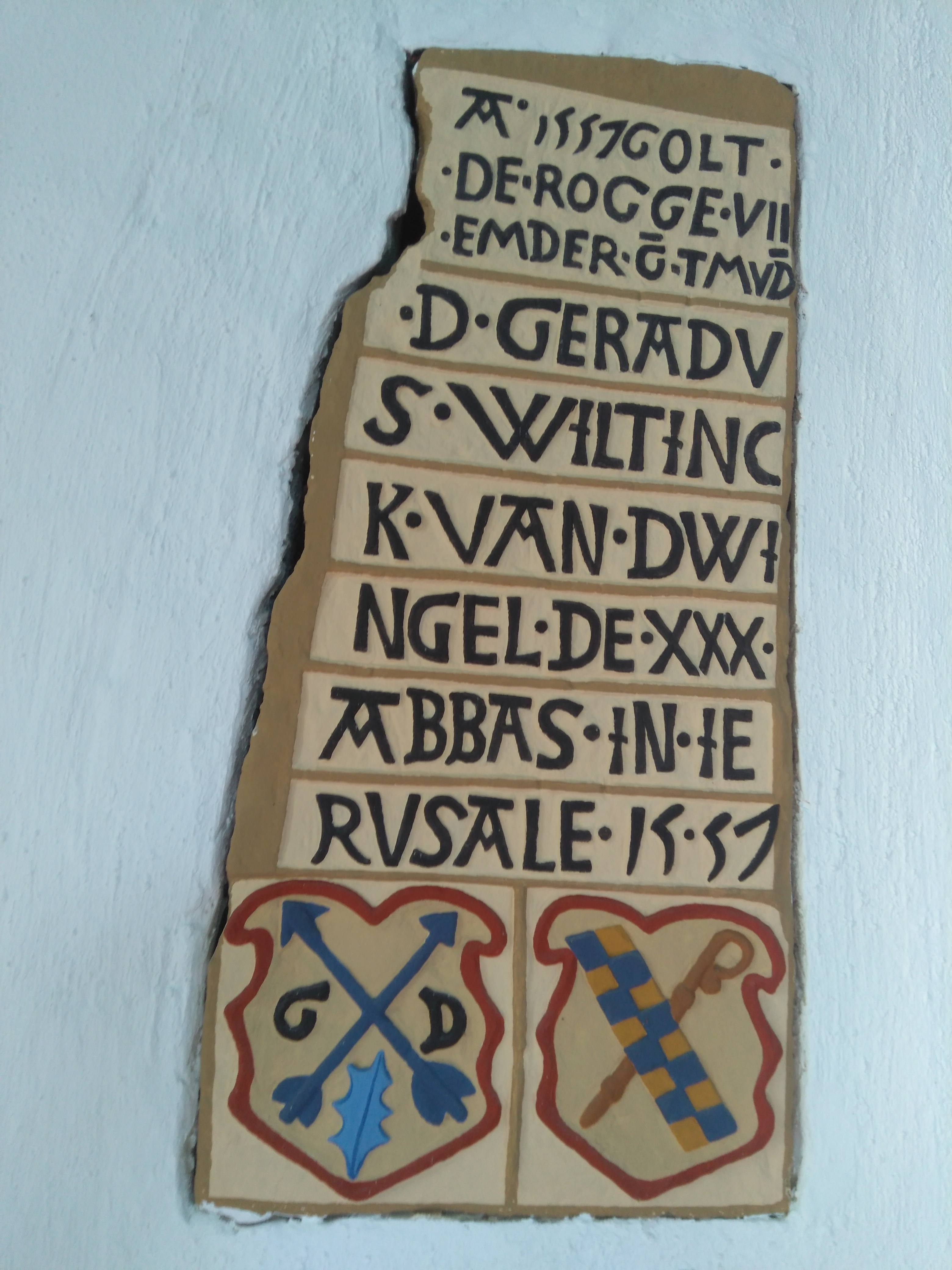 Gedenksteen aan de roggeprijs van 1557 in de hervormde kerk van Visvliet (Westerkwartier, Groningen). Verder wordt er melding gemaakt van Gerardus Wiltinck, afkomstig van Dwingeloo. Hij was de dertigste abt van Gerkesklooster, ook wel Jeruzalem genaamd.